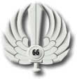 Fregio 66° Rgt Aeromobile Friuli